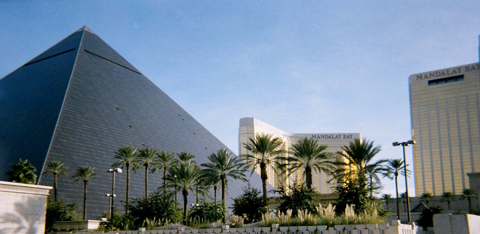 Luxor and Mandalay Bay